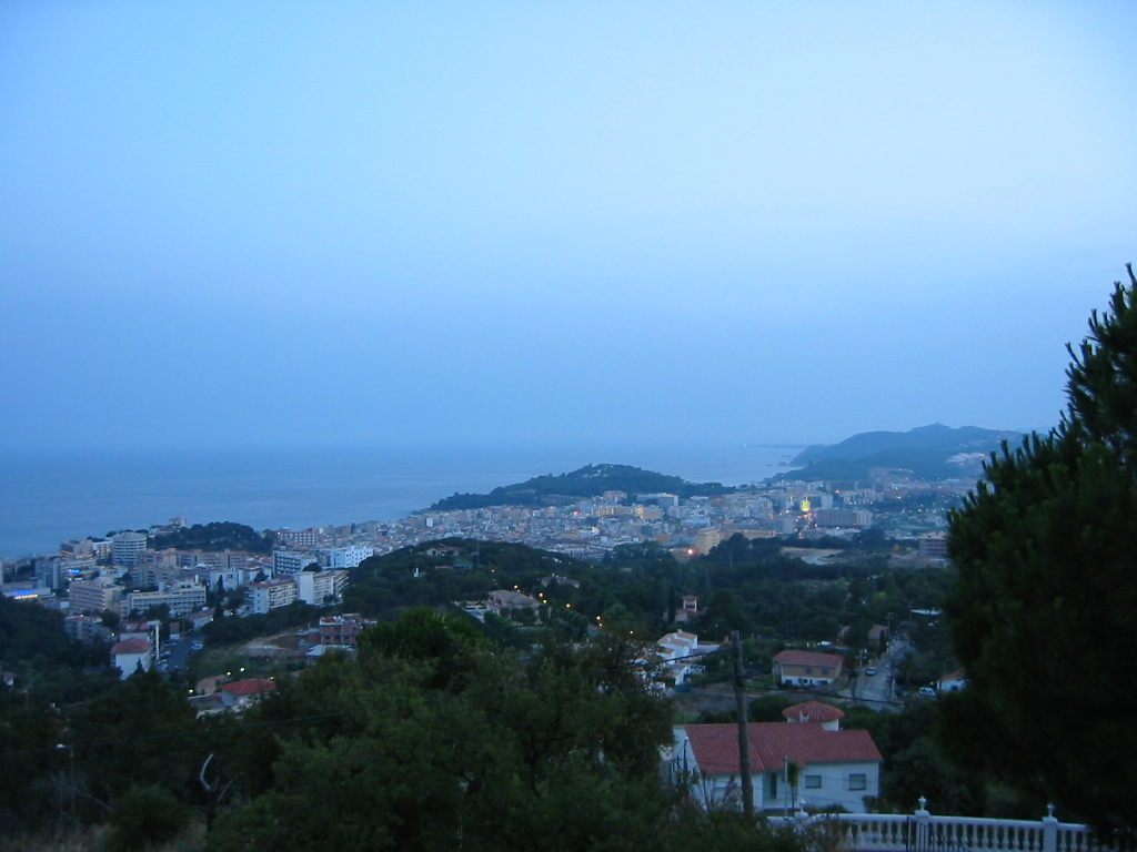 Blick über Lloret De Mar mit Mittelmeer im Hintergrund